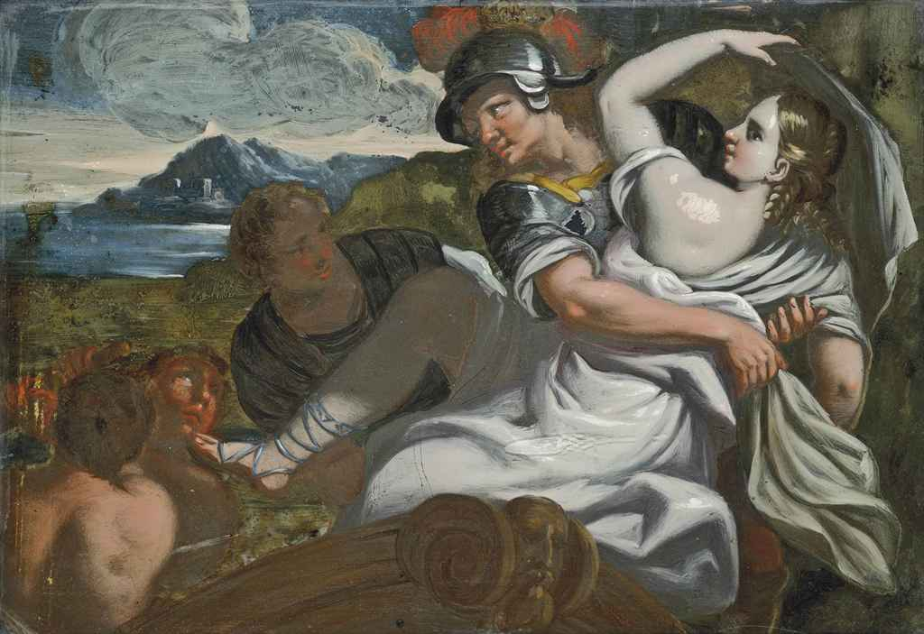 El rapto de Helena, óleo sobre cristal, 28 x 38 cm, subastado en Christie's, Londres, 2013